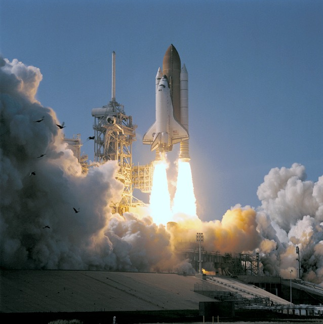 Space Shuttle Atlantis tijdens lancering